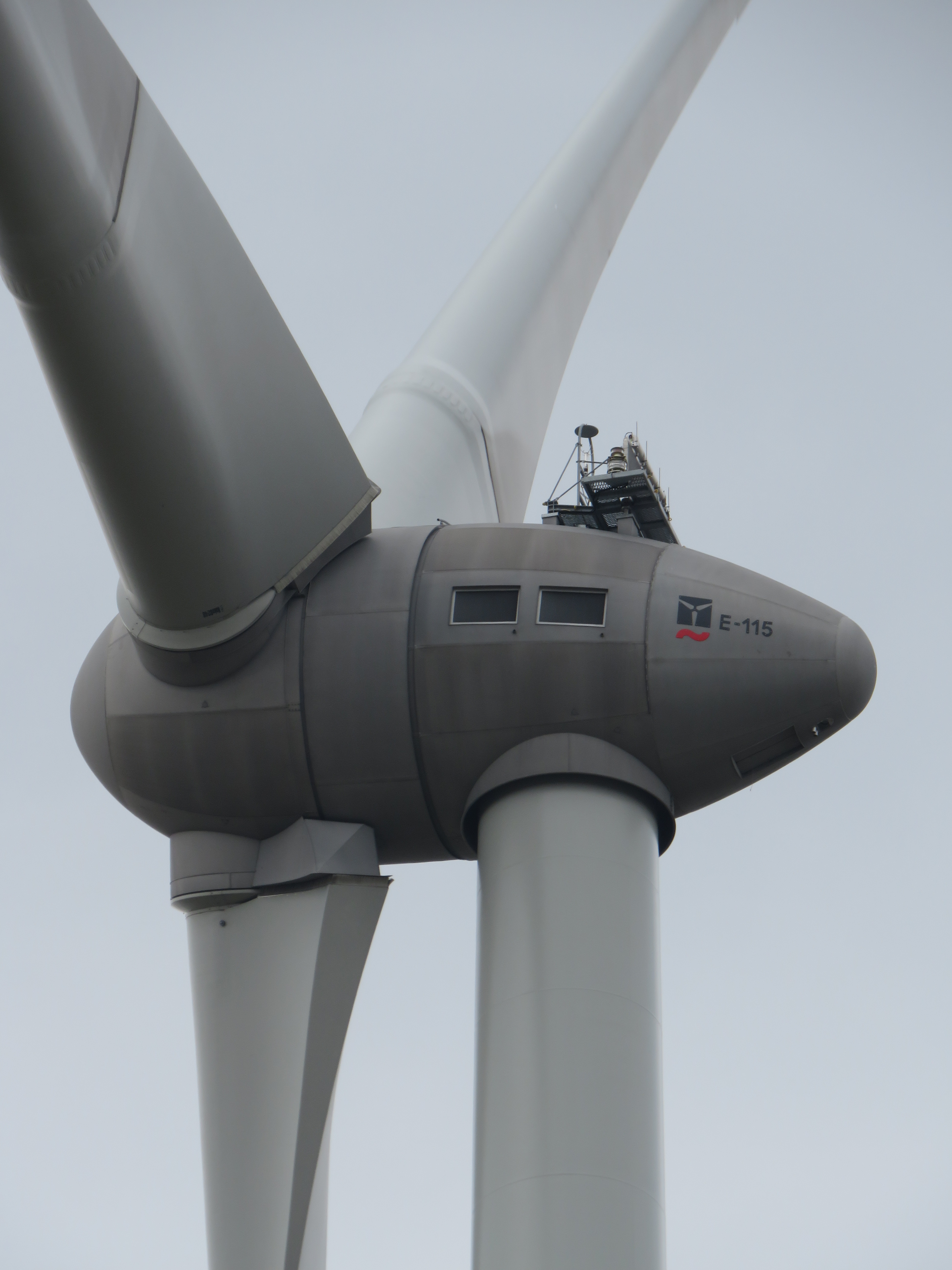 Gondel einer Windkraftanlage des Typs ENERCON E-115 im Windpark Eilerberg an der BAB 44